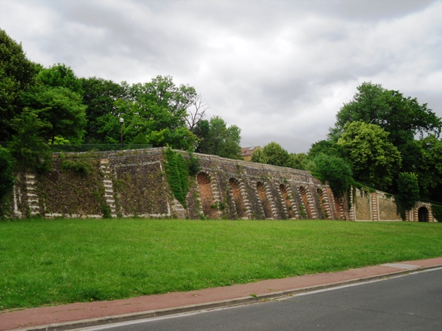 Le parc des Grottes de Juvisy-sur-Orge (91)